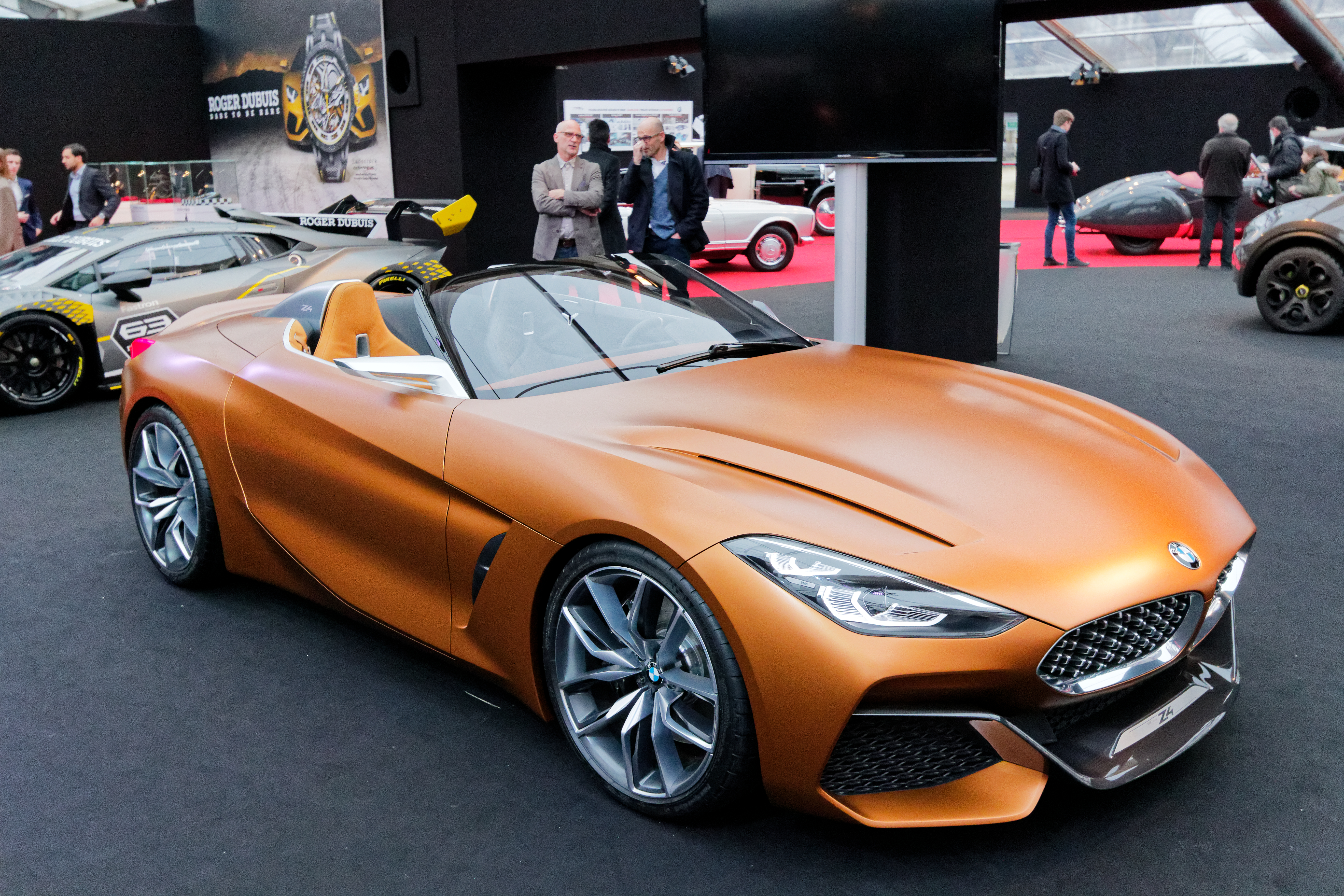 Un véhicule exposé lors du festival automobile international 2018.